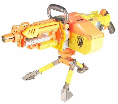 Aleks.